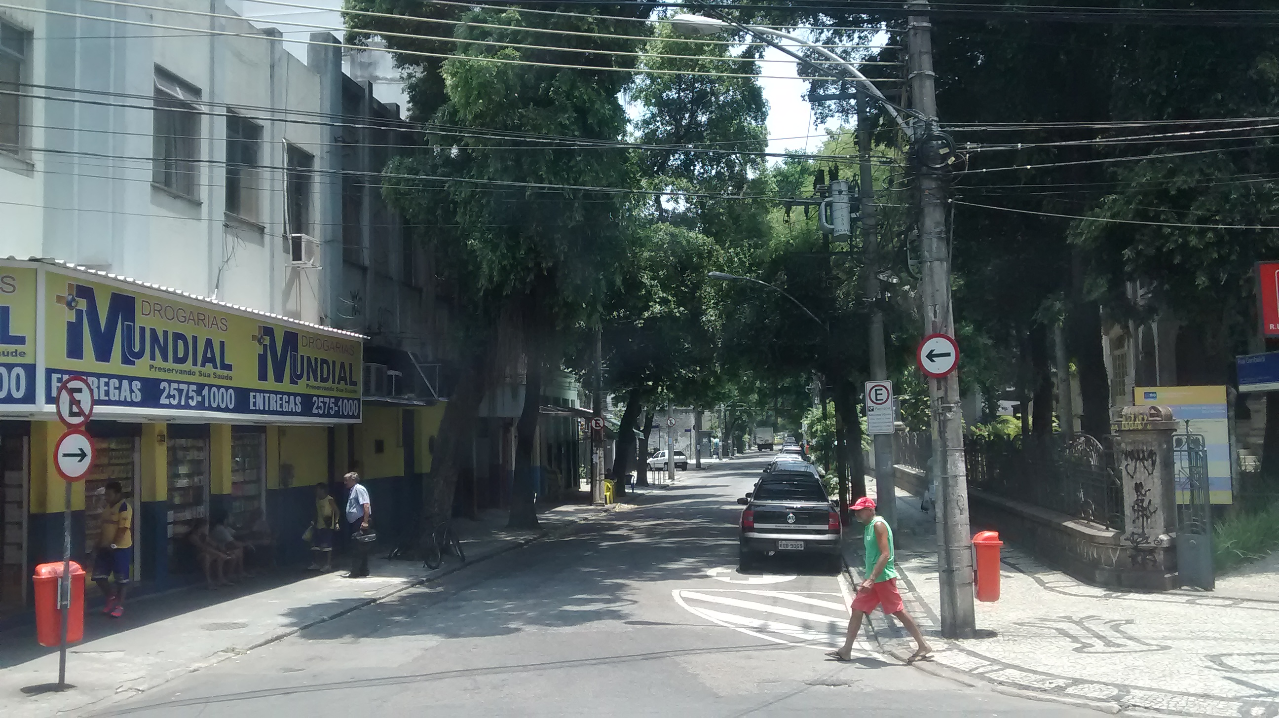 Aspecto de uma rua do bairro da Muda, no Rio de Janeiro.